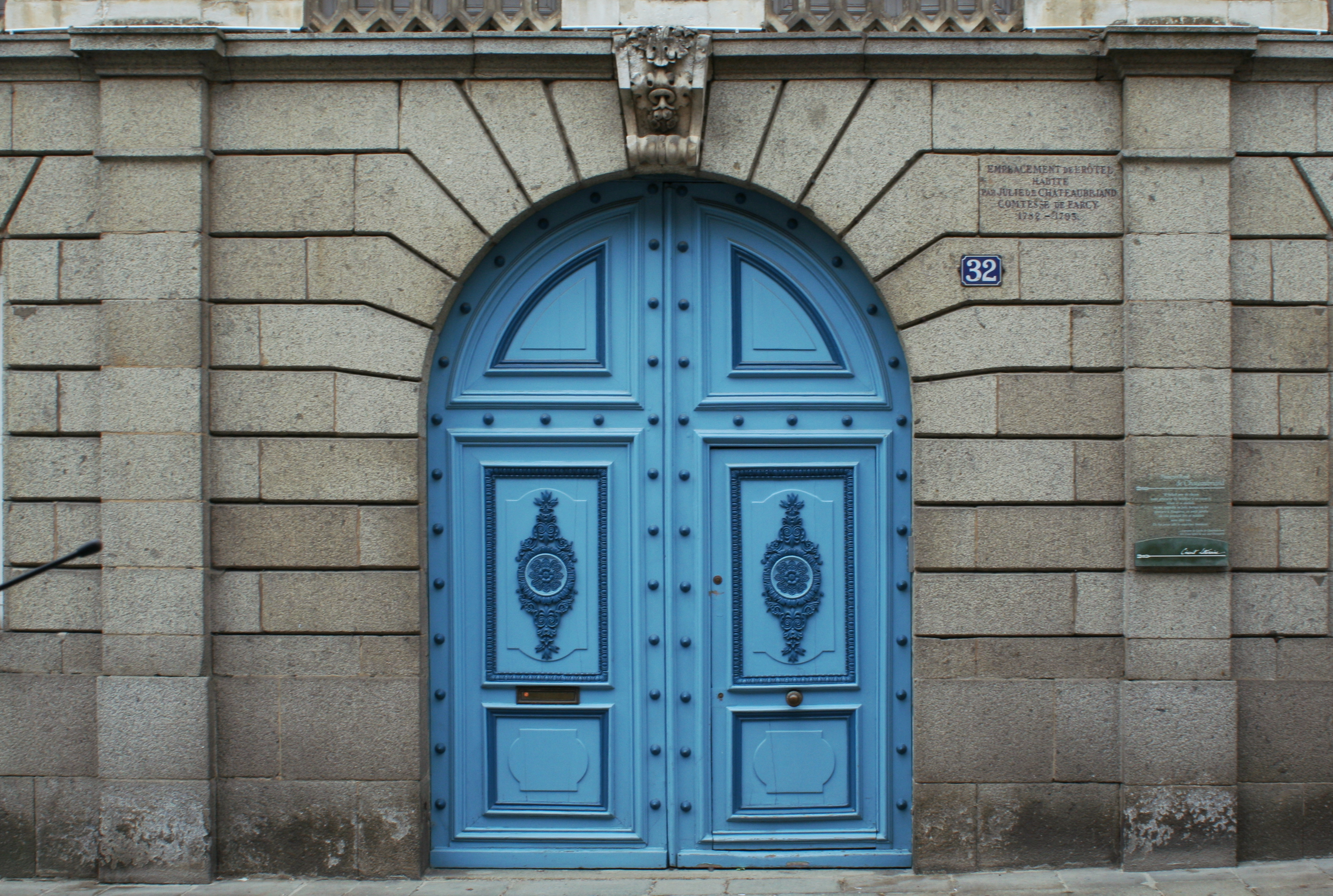 Porte de l'Hôtel Danjou de la Garenne au 32 rue Nationale, Fougères, Ille-et-Vilaine, France.